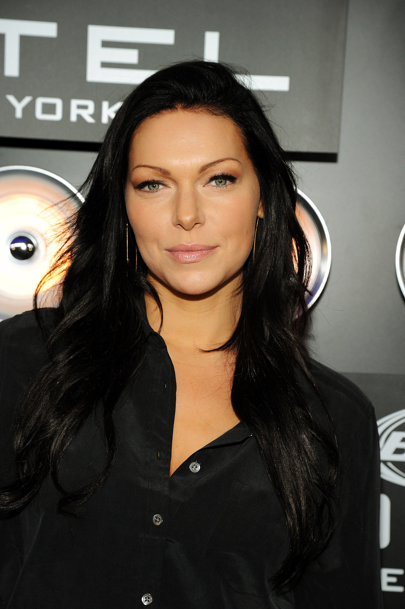 A great actress